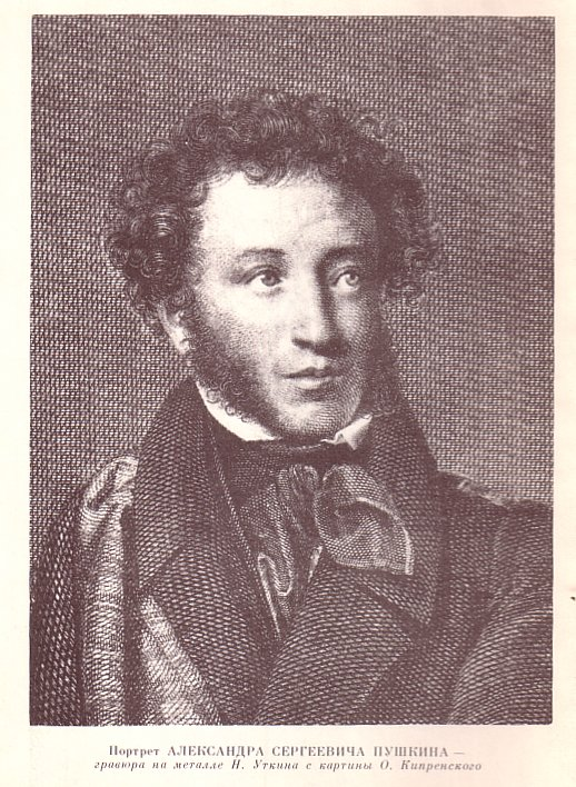 Портрет АЛЕКСАНДРА СЕРГЕЕВИЧА ПУШКИНА - гравюра на металле Н. Уткина с картины О. Кипренского